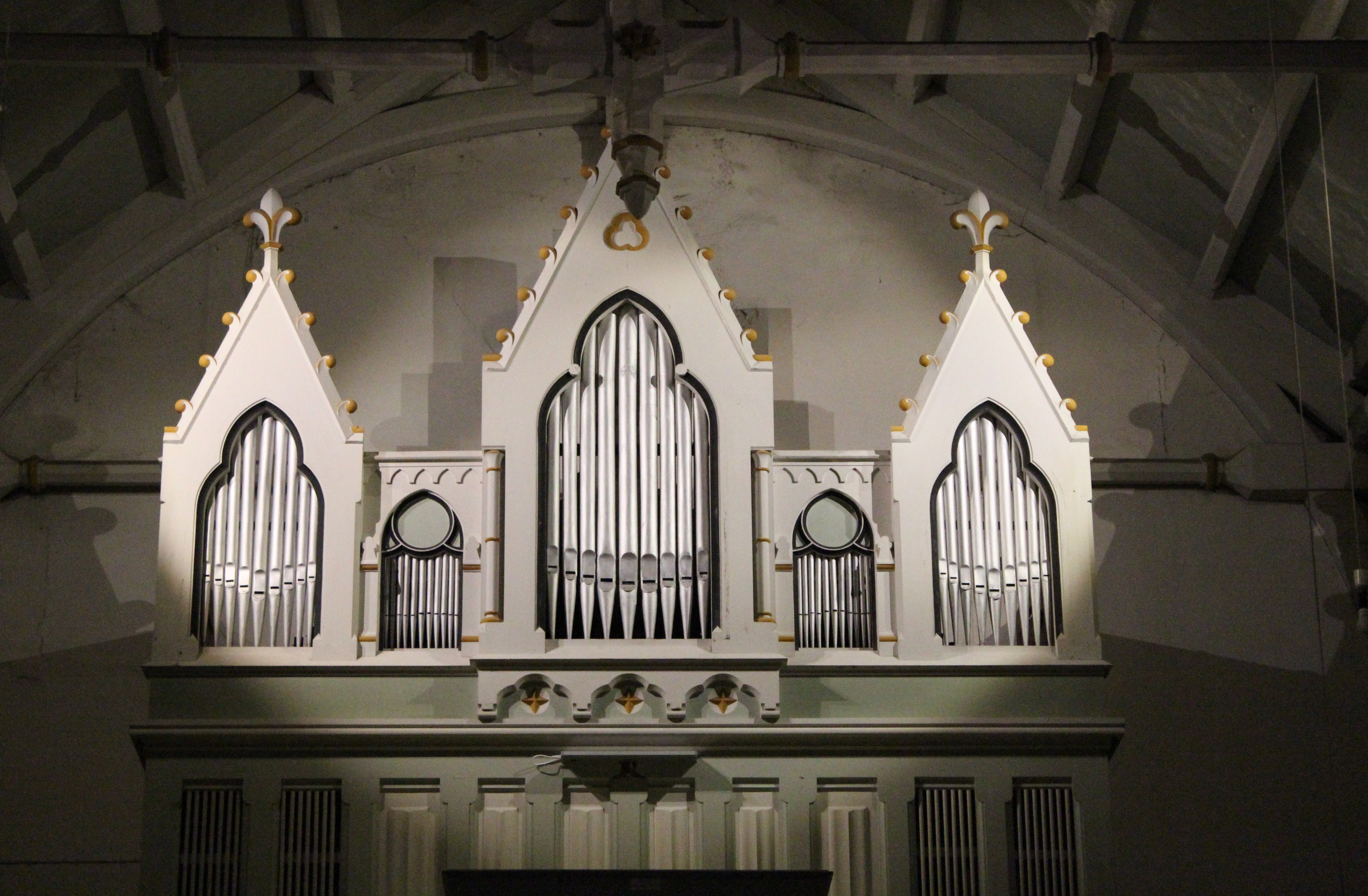 Kühn-Orgel von 1901